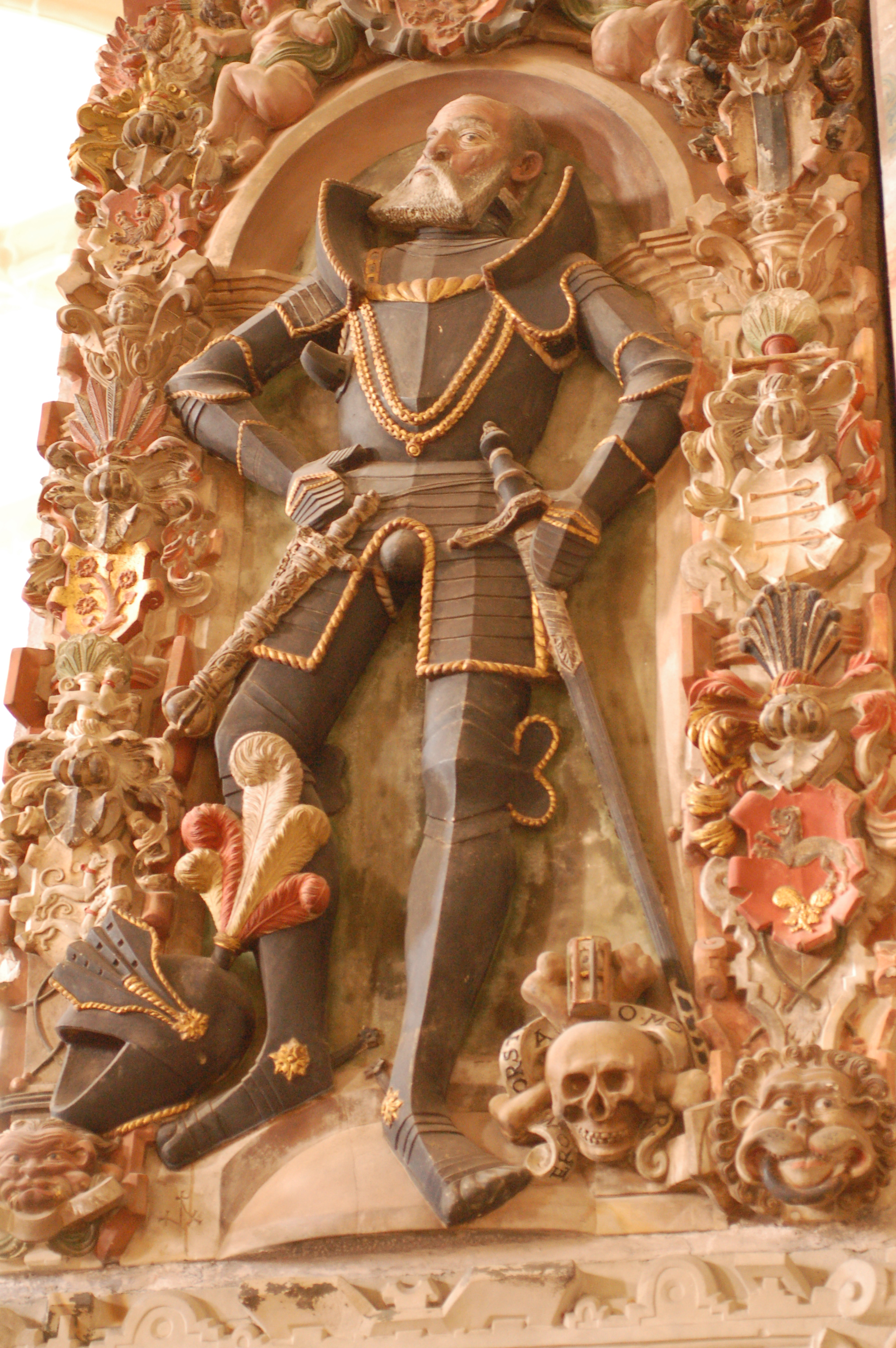 Kirche St. Stephani in Osterwieck